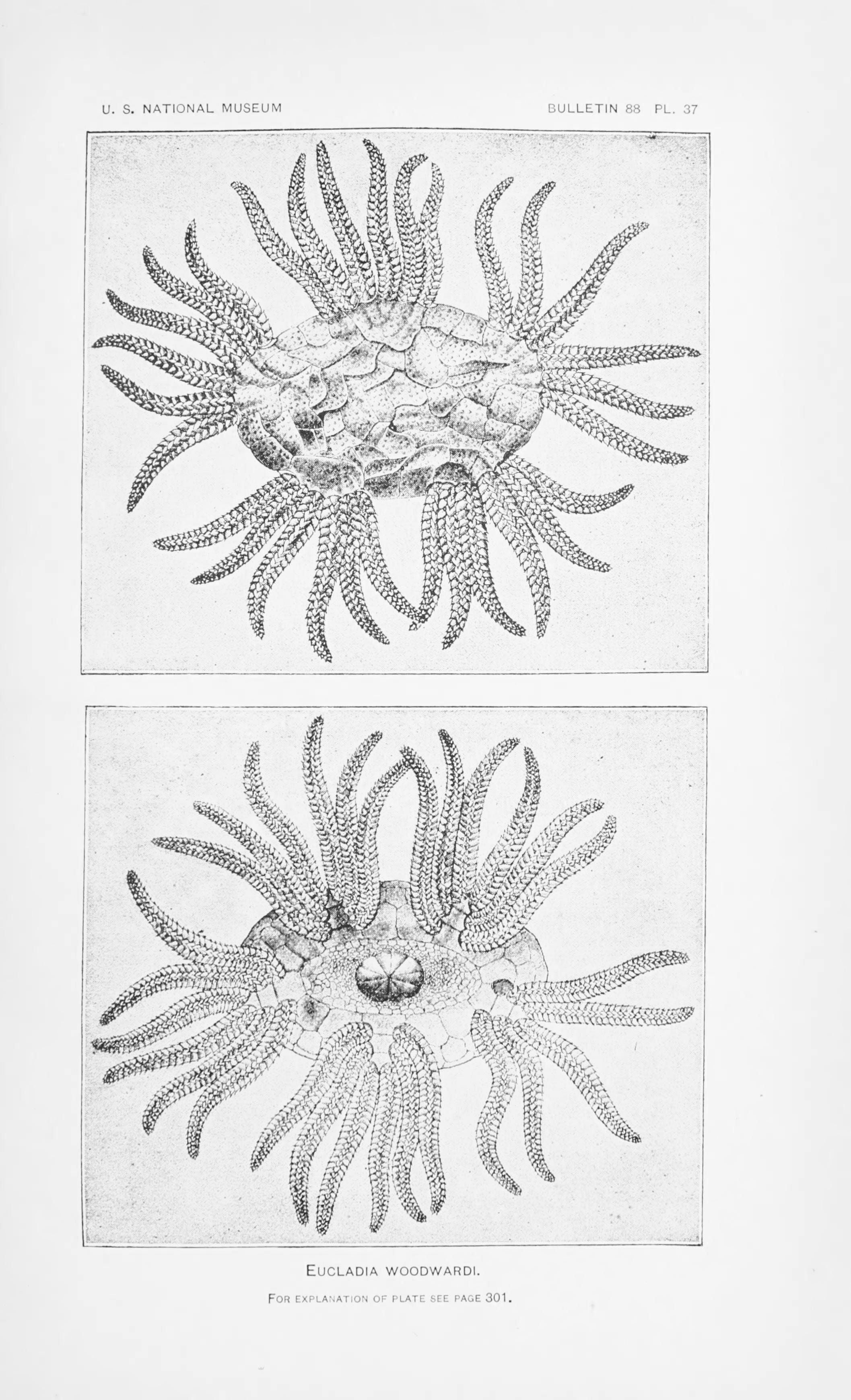 plate of Eucladia woodwardi (an Ophiocystioidea) from a monograph by American paleontologist Charles Schuchert (1915).